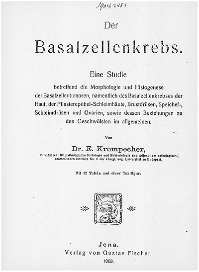 Krompecher Ödön: A basalsejtes rák című könyvének címoldala